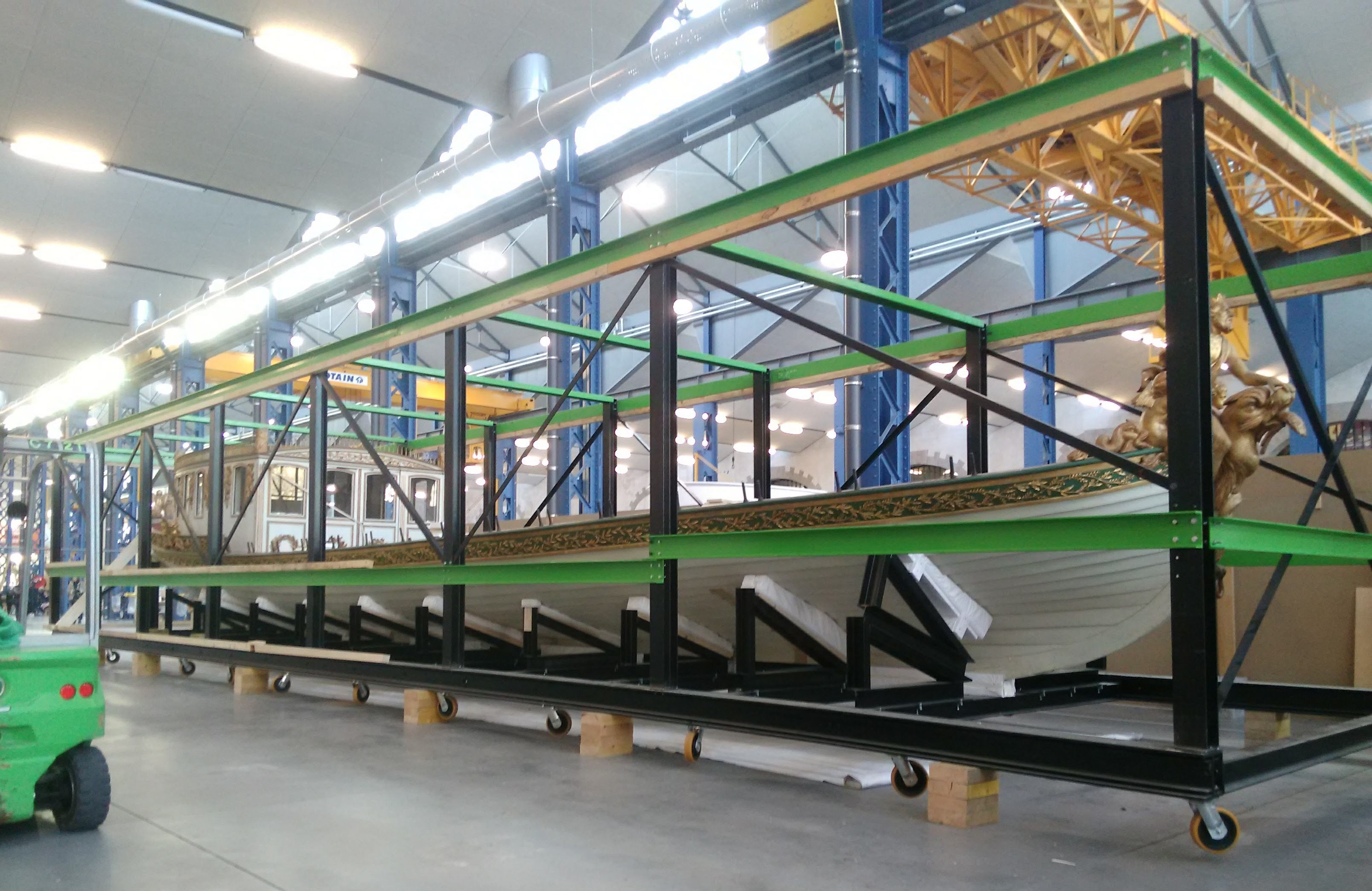 Le canot de l'empereur avec son support de transport après ouverture du caisson de protection, le 22/01/2020 aux ateliers des Capucins à Brest.